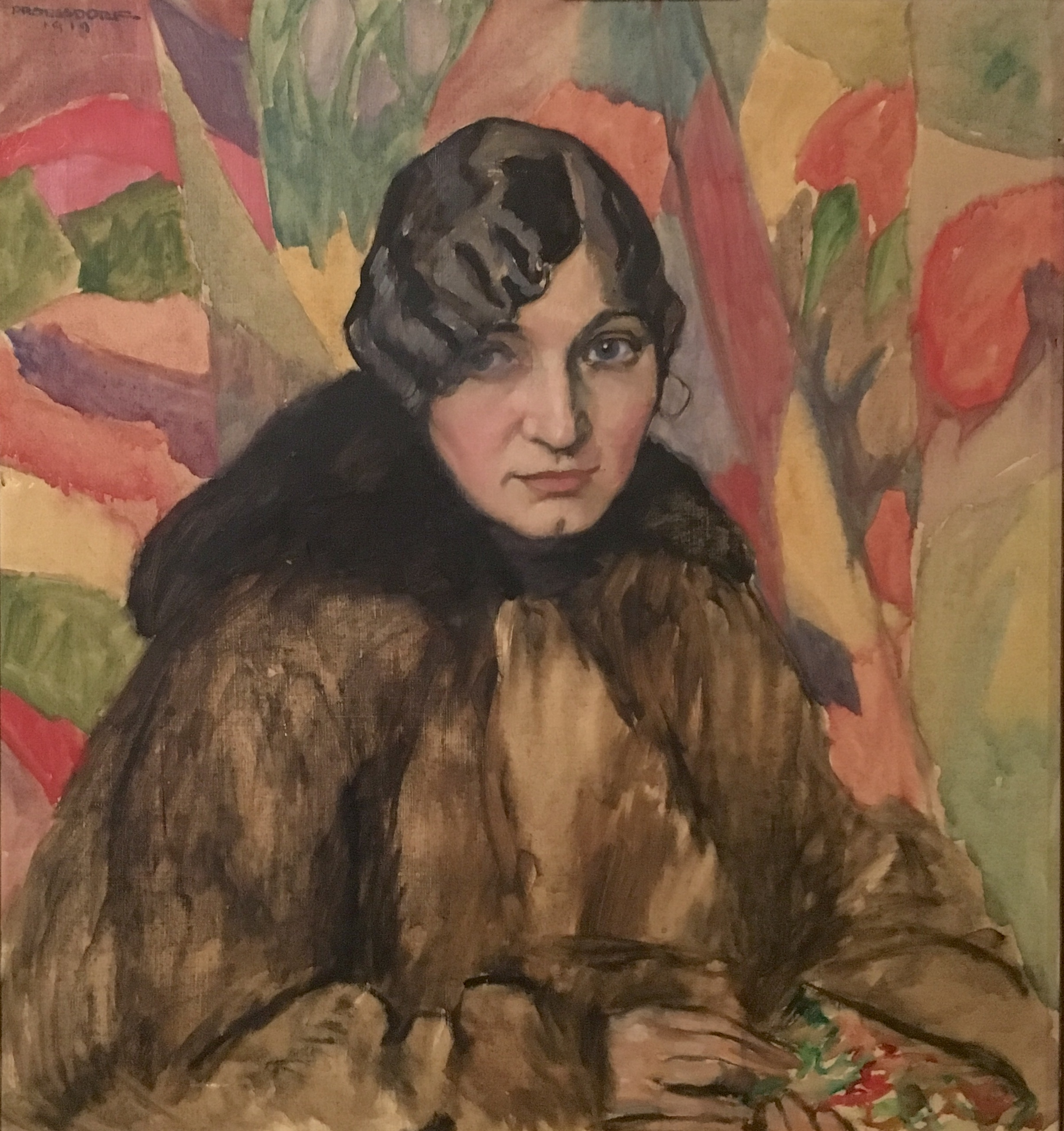 Alfred R Proessdorf, kvinnoporträtt, signerad och daterad 1919, olja på duk, 63x59 cm